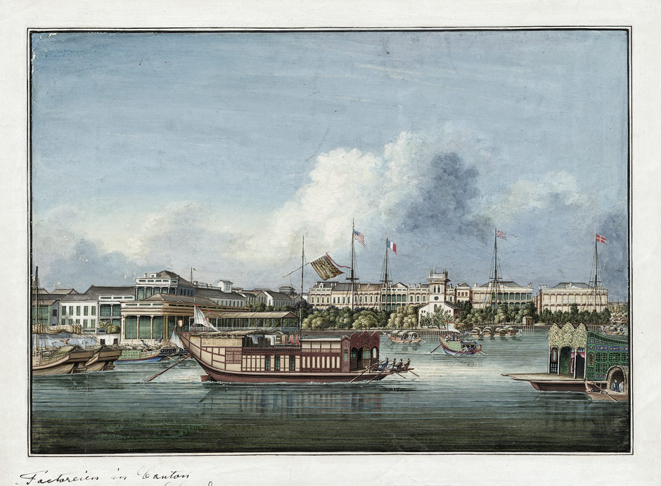 Canton (Guangzhou), Die Hongs oder die ausländischen Factoreien am Perlfluß in Canton. Gouache auf Velin, um 1850